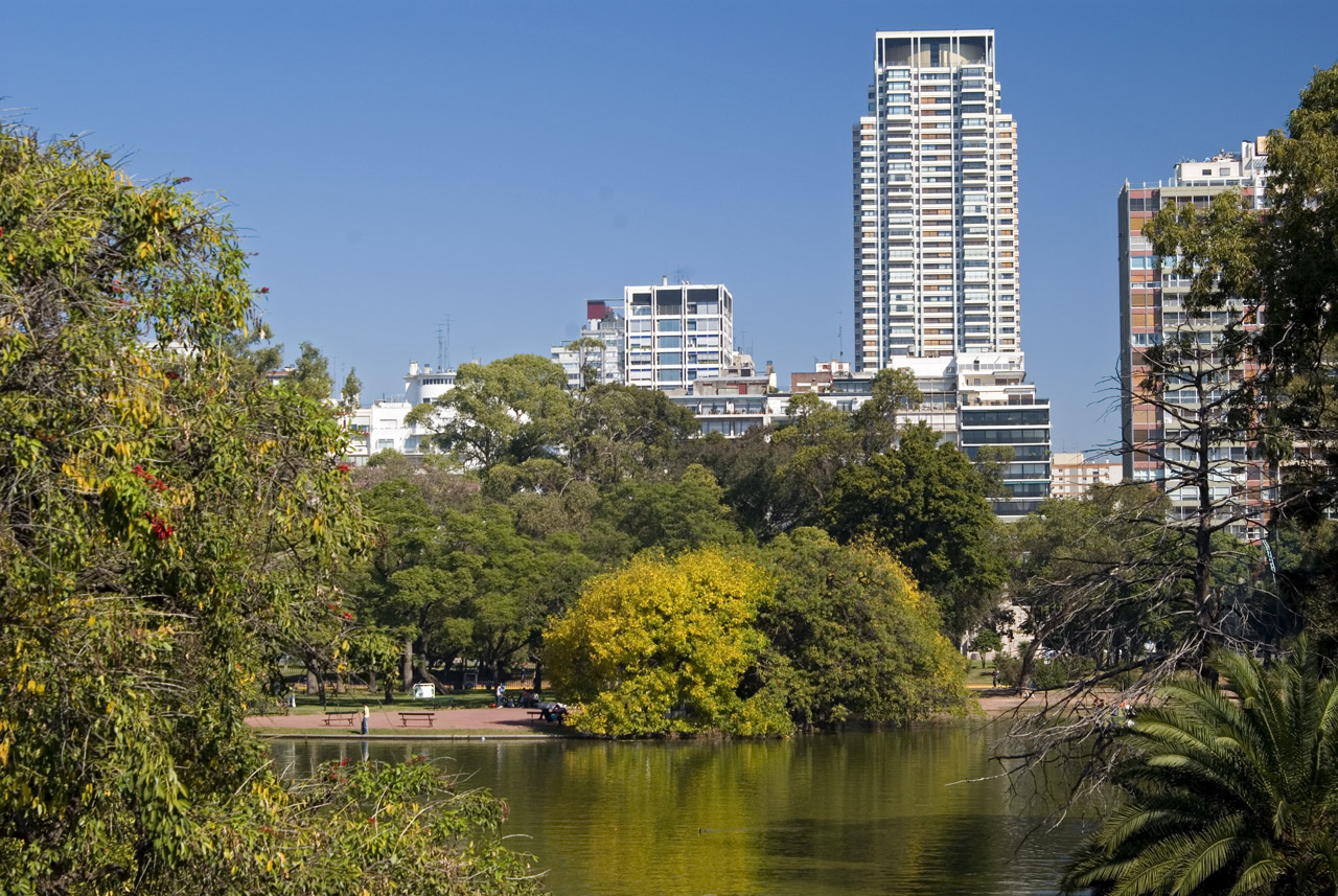 Rose garden lake, February 3 Park, Buenos Aires.